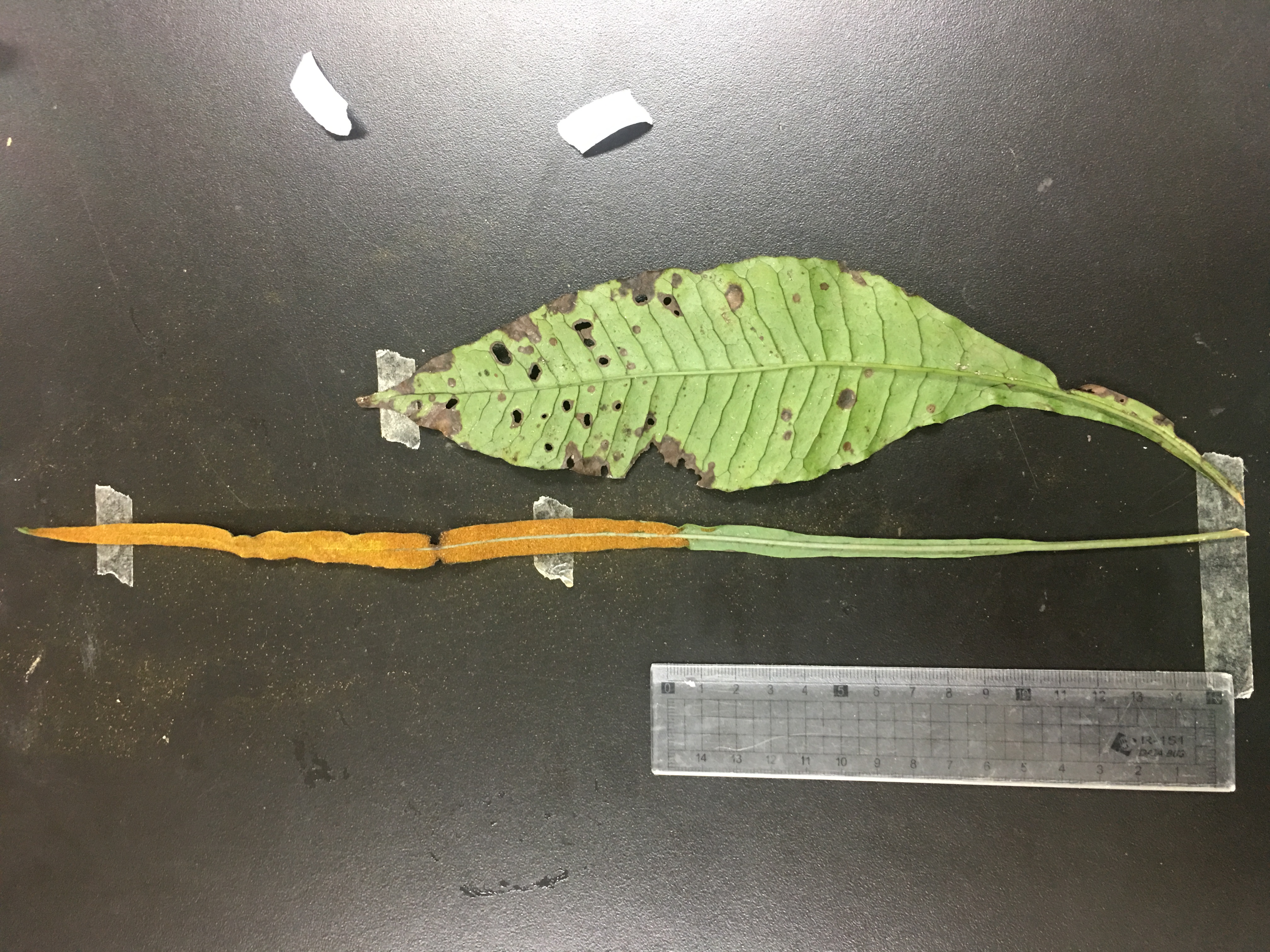 萊蕨孢子葉與營養葉比較